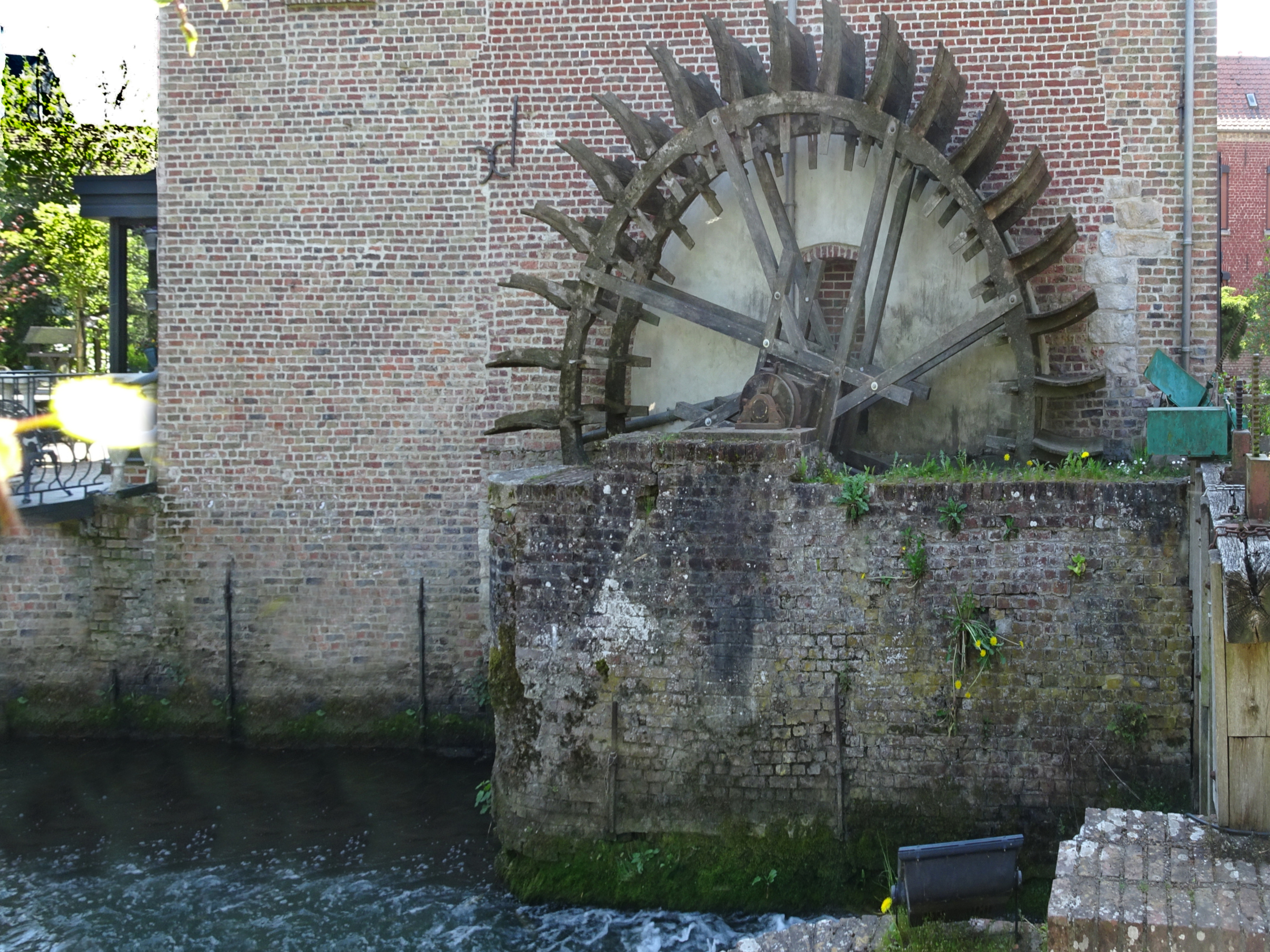 L'ancien moulin à eau (1681), sur la Guarbecque Saint-Venant Pas-de-Calais.- France.